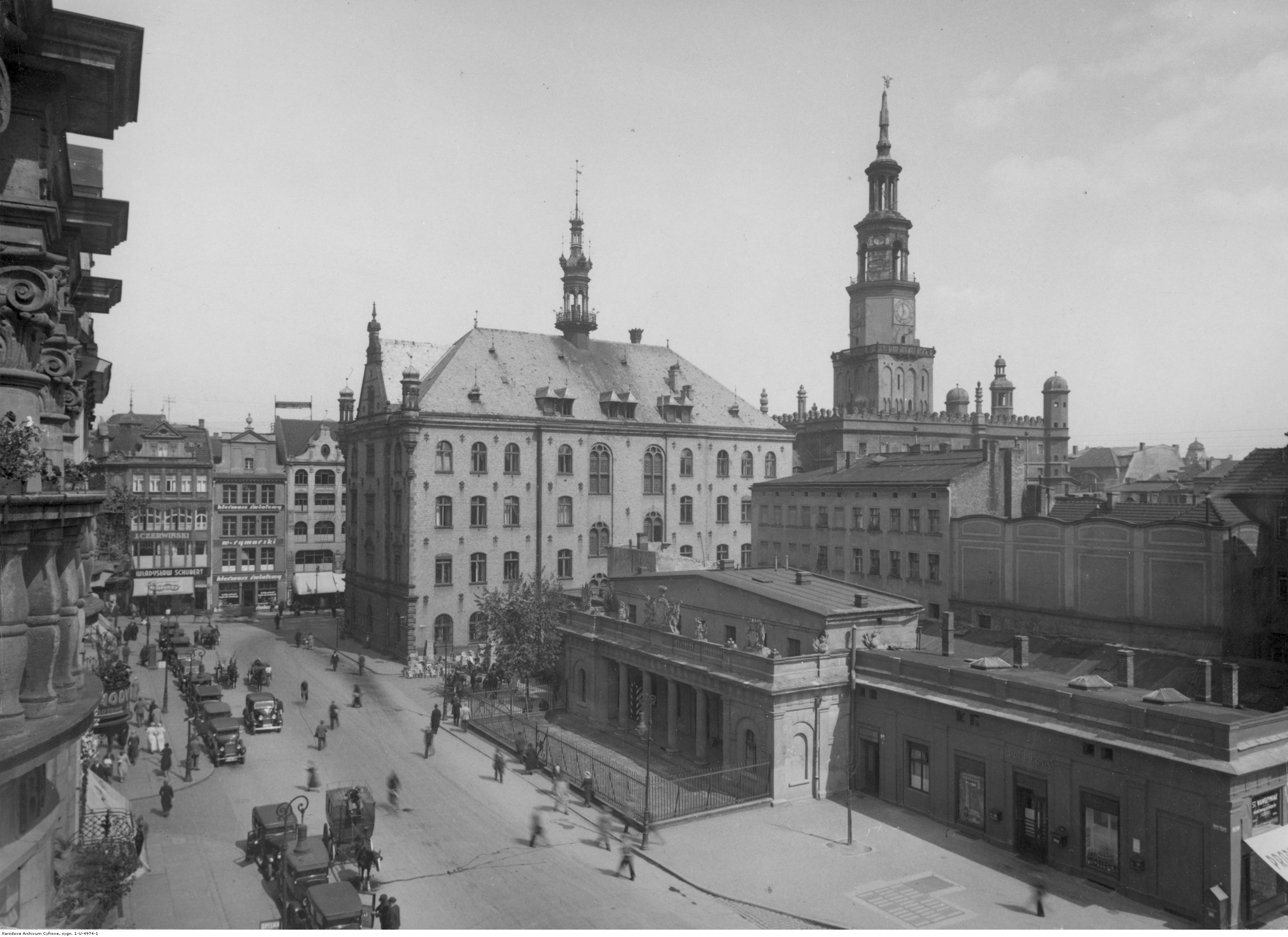 Poznań Stary Rynek. Gmach odwachu i Nowy Ratusz. Po II wojnie światowej Nowy Ratusz nie został odbudowany.